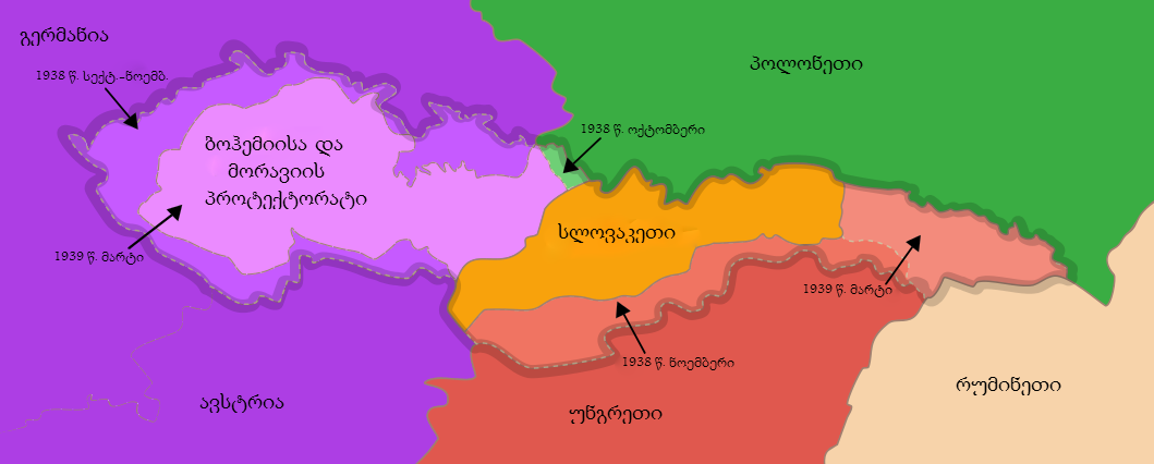 ჩეხოსლოვაკიის რუკა 1939 წლის შემდეგ